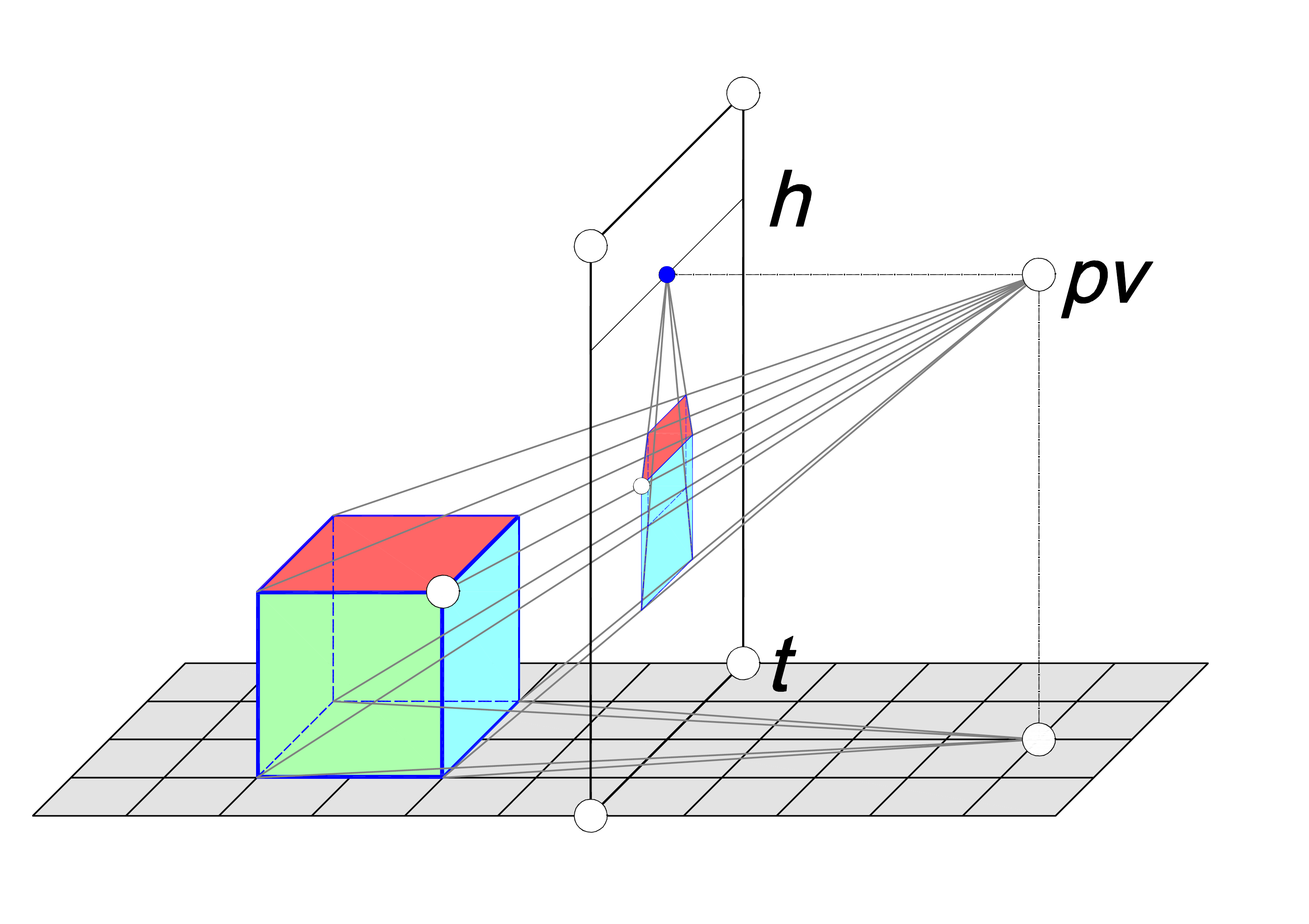 Elementos de una perspectiva cónica, representados en una vista tridimensional